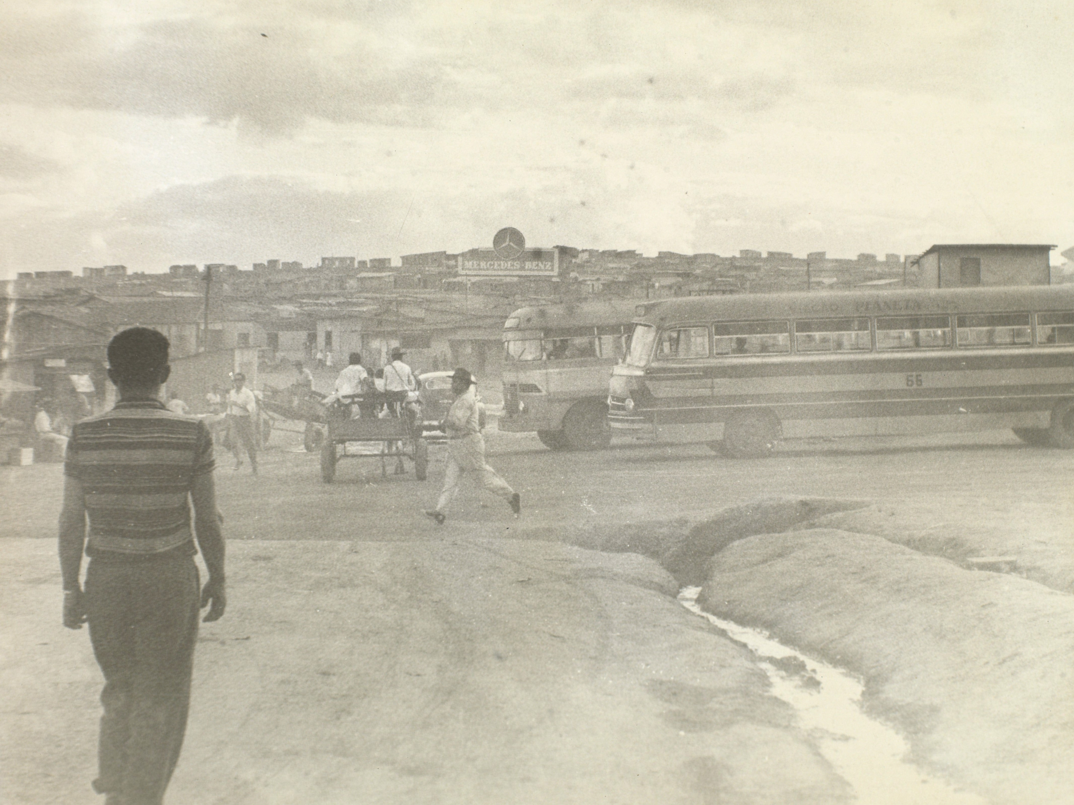 Fotografia do Fundo Correio da Manhã, sob a guarda do Arquivo Nacional.